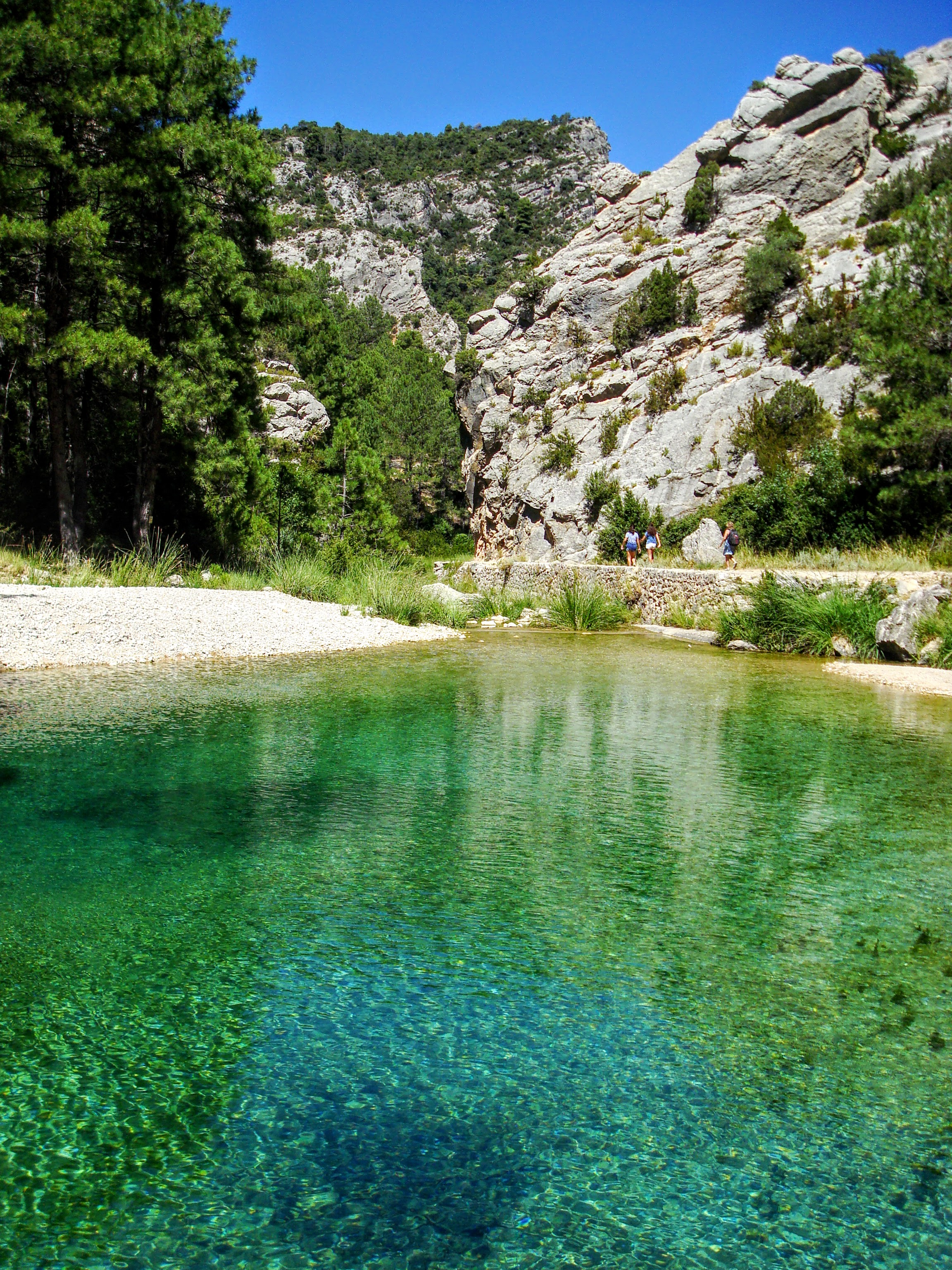 Els Ports de Beseit This is a photography of a Site of Community Importance in Spain with the ID: ES2420036. Natura2000 entry, EEA entry